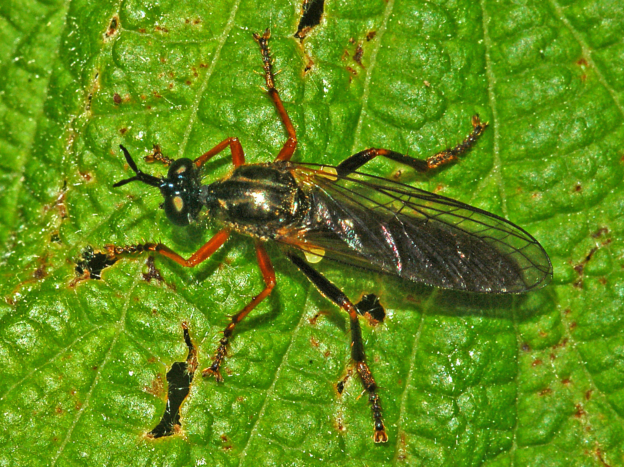 Asilidae - "Dioctria rufipes". Female. - Piani di Praglia, Genova, Italy